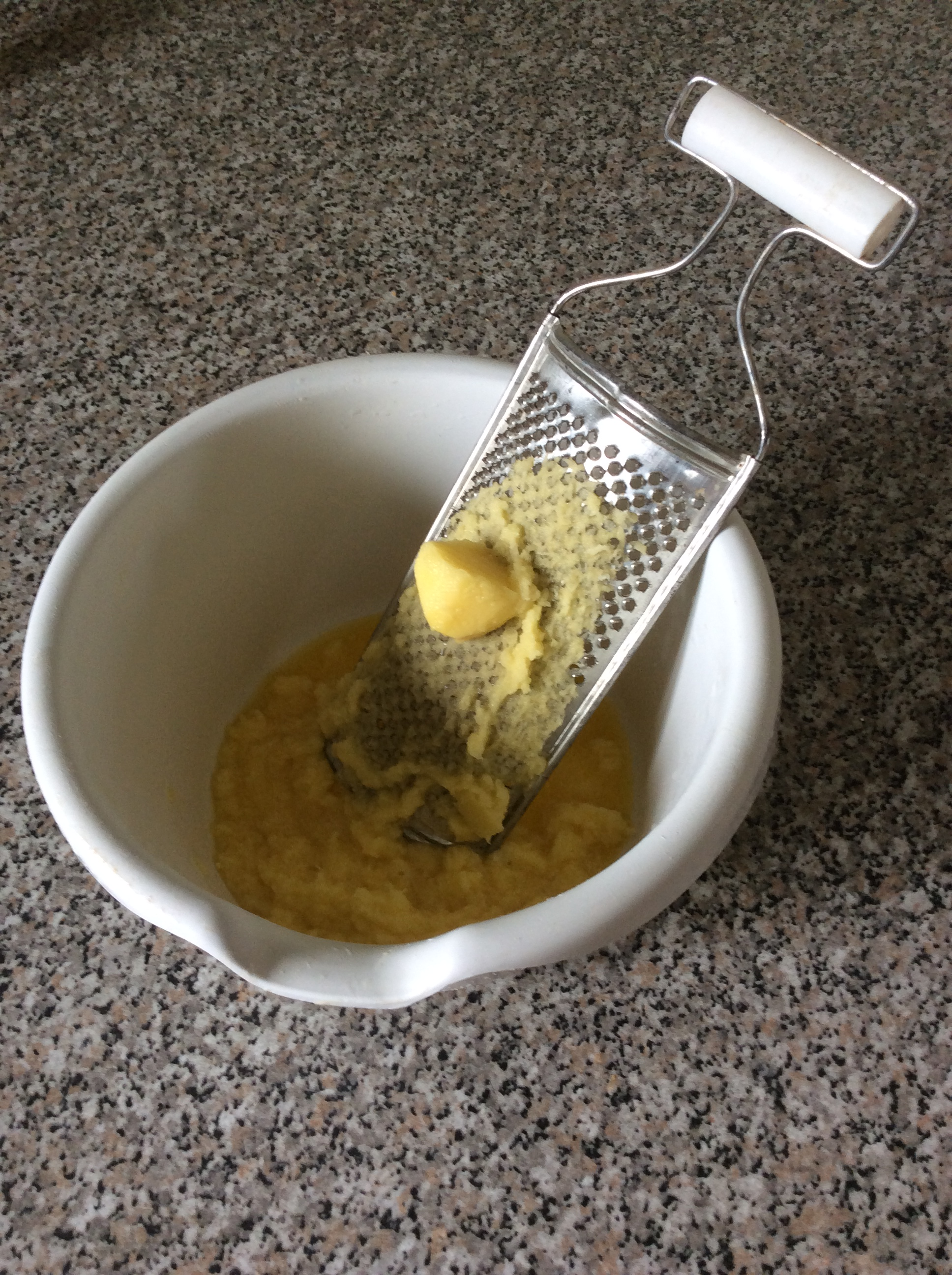 Râpé à pomme de terre pour beignets vosgiens avec visualisation du degré de râpage